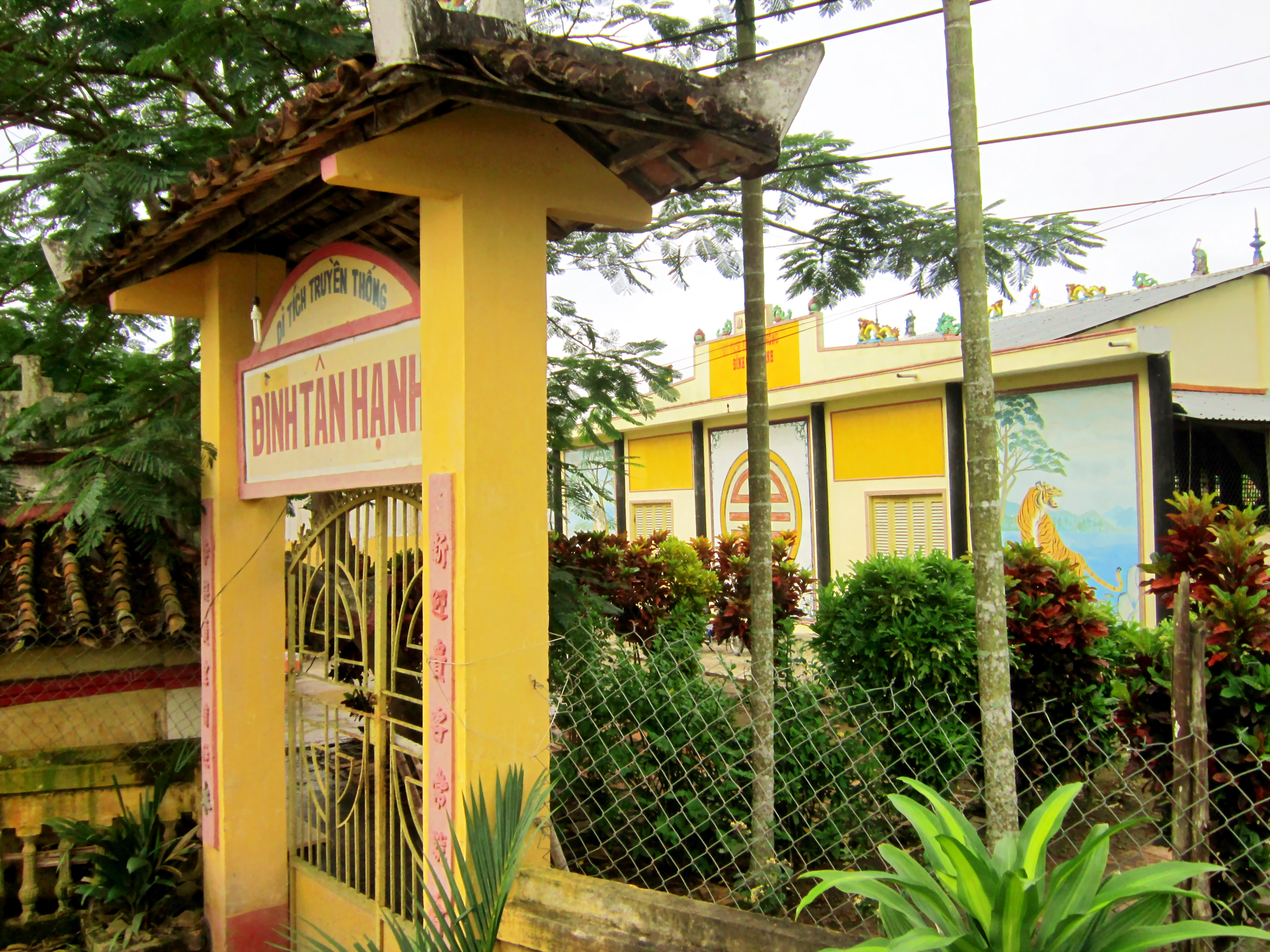 Đình Tân Hạnh ở kế bên chợ xã Tân Hạnh, huyện Long Hồ, tỉnh Vĩnh Long, Việt Nam. Đây là một ngôi đình cổ thờ Thành hoàng Bổn cảnh, có sắc phong dưới triều vua Tự Đức, và đã được xếp hạnh là di tích cấp tỉnh.